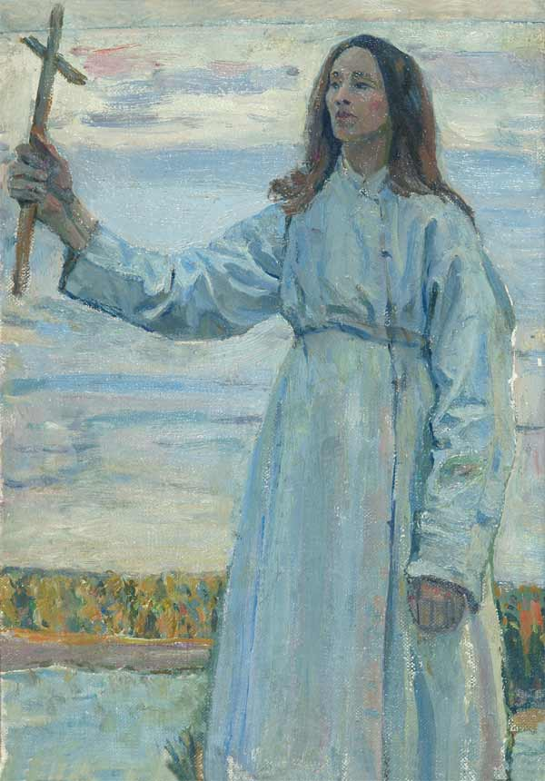 Послушник с крестом